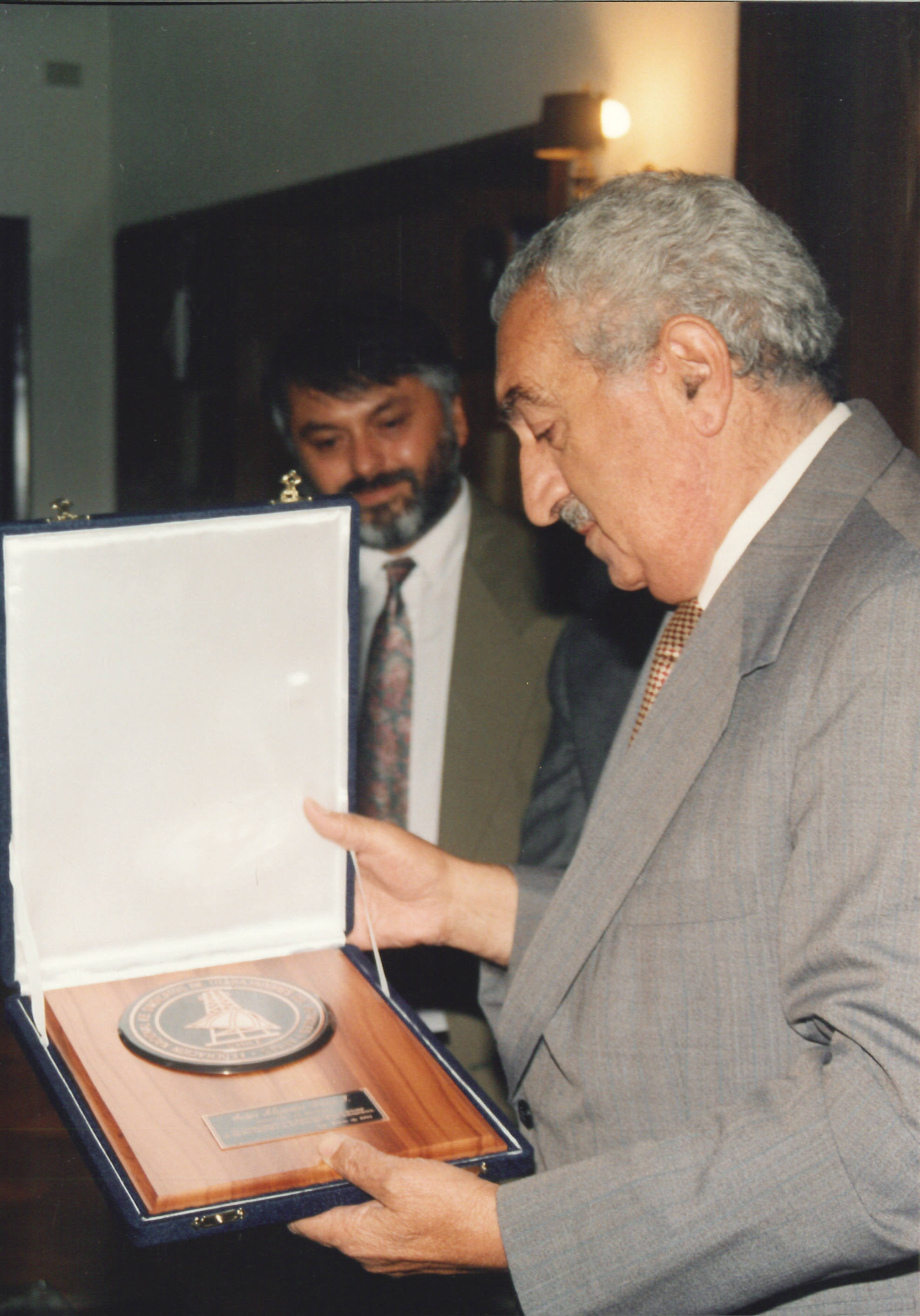 Alejandro Hale, ministro de Minería, recibe un reconocimiento de la Empresa Nacional de Petroleos (ENAP). 1994